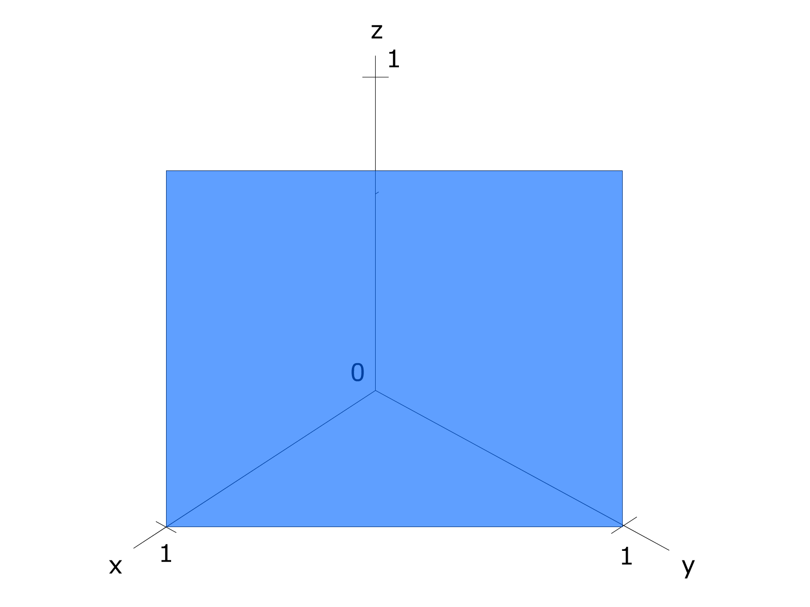 Miller Index 110